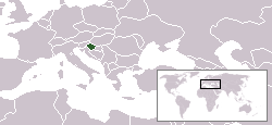 Une théorie sur la position réelle du pays de Syldavie dans Les Aventures de Tintin. Selon autres théories le pays doit se placer dans ou autour de la Roumanie.